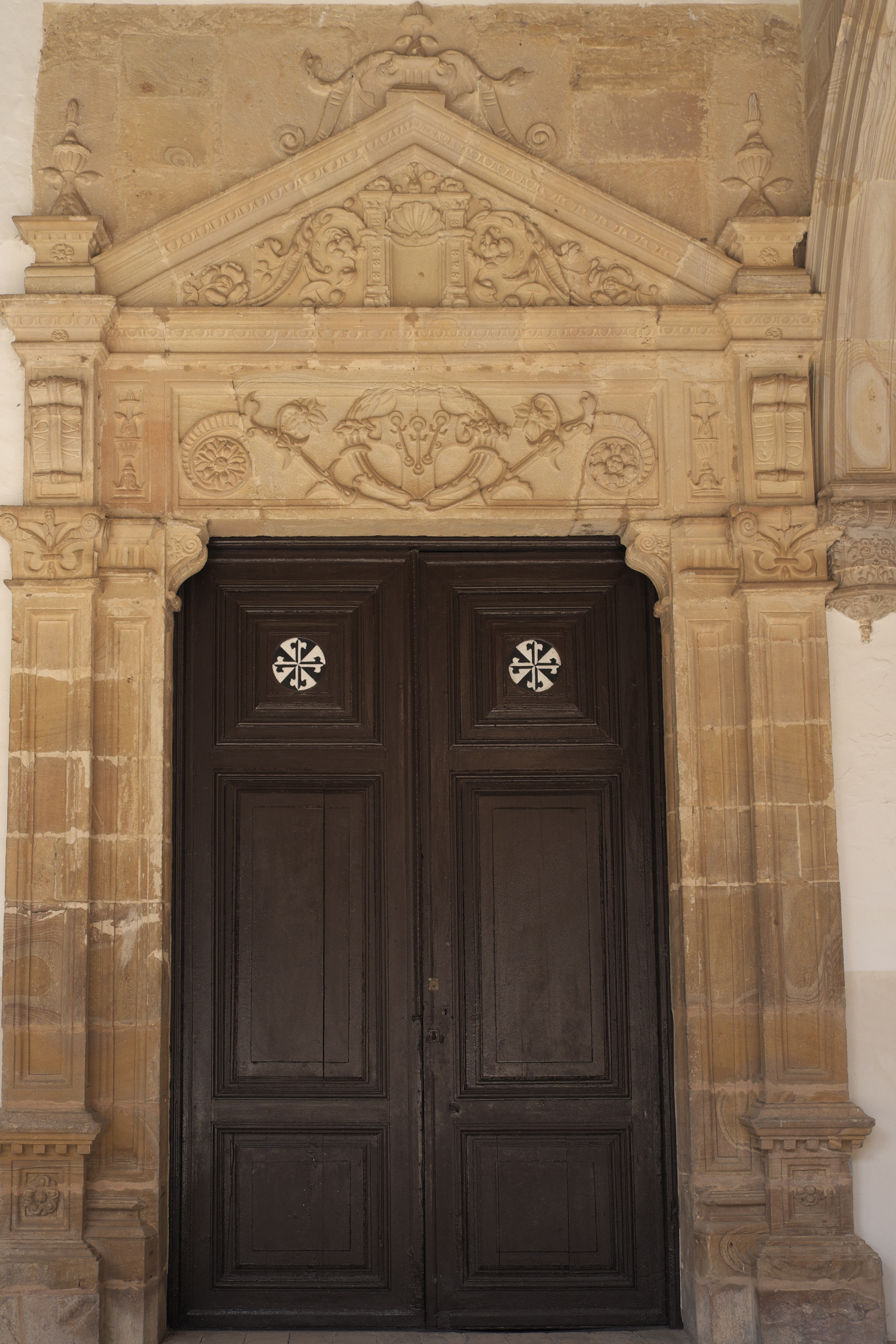 Ehemaliges Frauenkloster des Calatrava-Ordens, Convento de la Asunción (Mariä Himmelfahrt), in Almagro in der Provinz Ciudad Real (Kastilien-La Mancha/Spanien), Tür mit Renaissancedekor im Kreuzgang